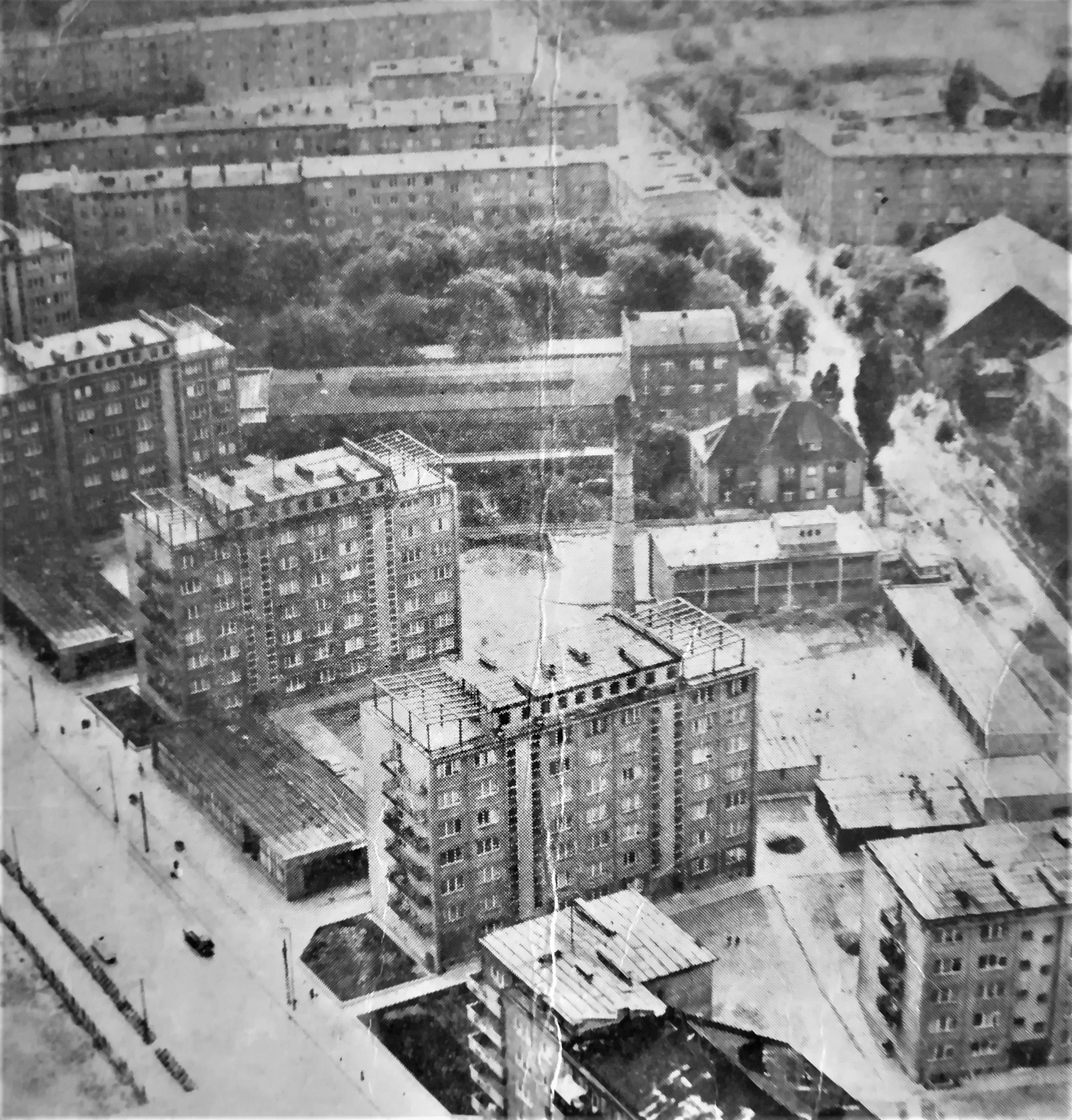 Ulice Grunwaldzka i Marcelińska w Poznaniu - 1967 r.